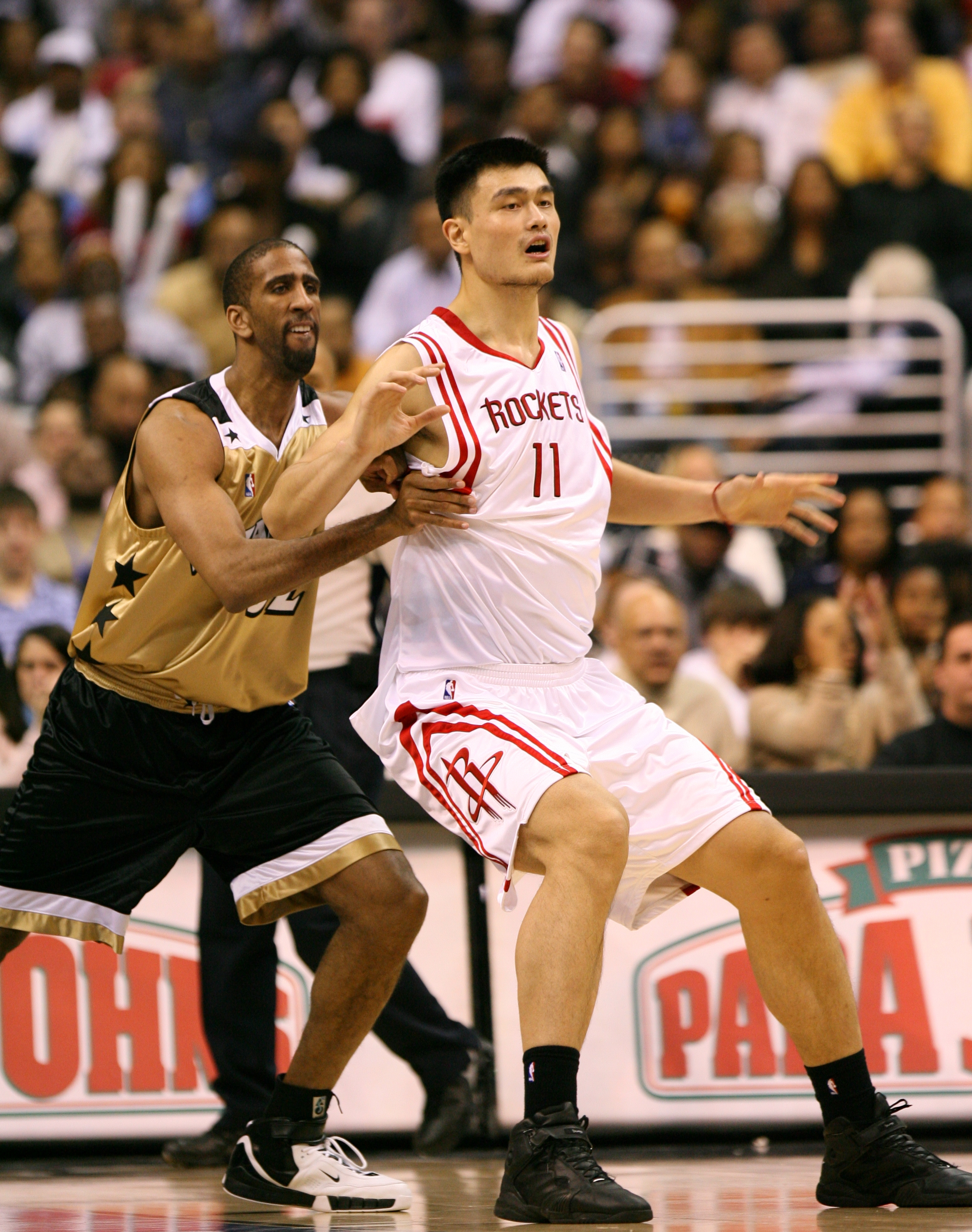 Yao Ming